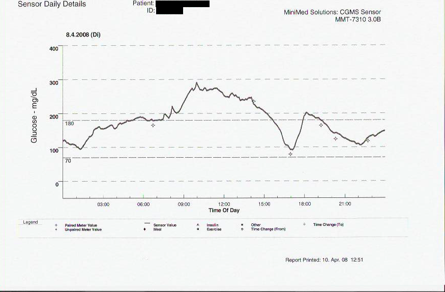 Dawn Phenomenon; a rise in blood glucose in the early morning / Blutzuckeranstieg in den frühen Morgenstunden, Ursache ist vermutlich ein nachlassender Bolus. für ein Dawn Phänomen ist die Zeit zu früh.